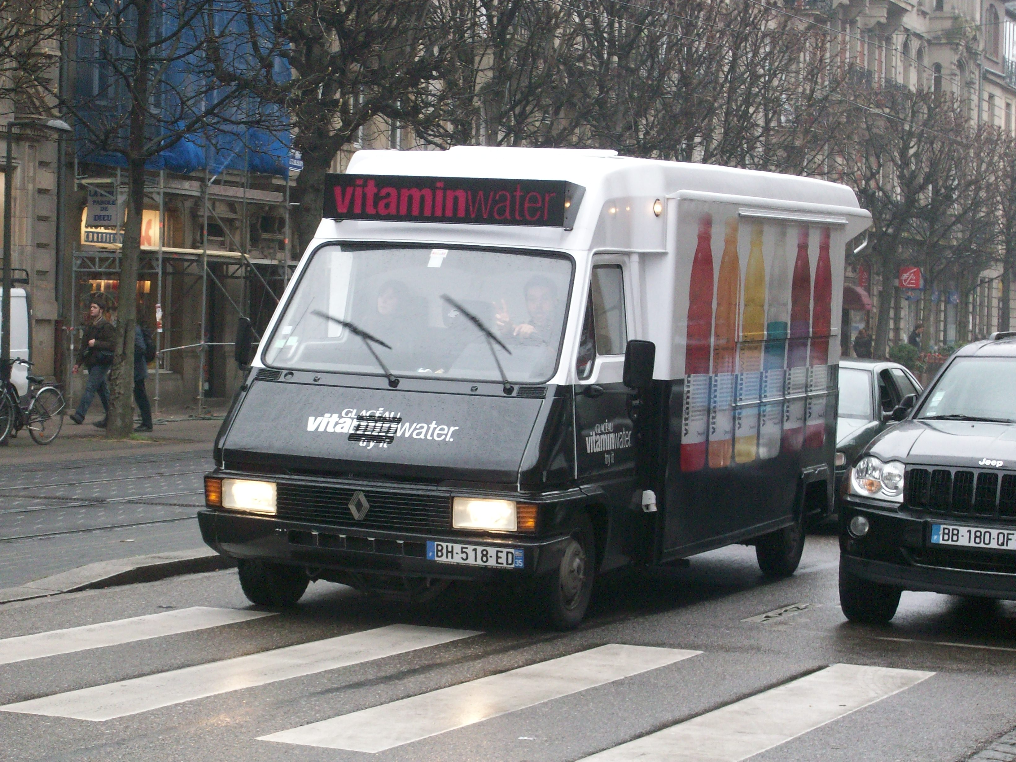 Véhicule publicitaire "Vitamin Water" à Strasbourg